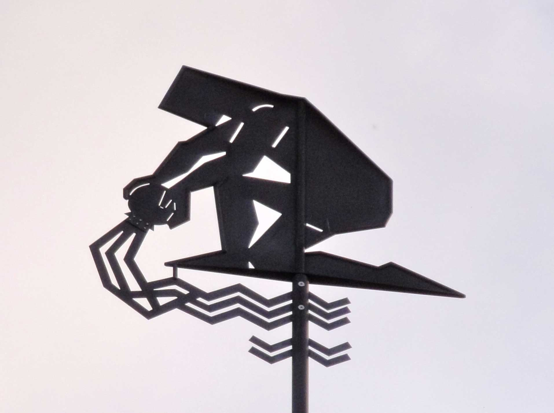 Windvaan in de vorm van een gestileerde figuur met waterkruik op het gebouw van het waterleidingbedrijf Dunea in Bergambacht